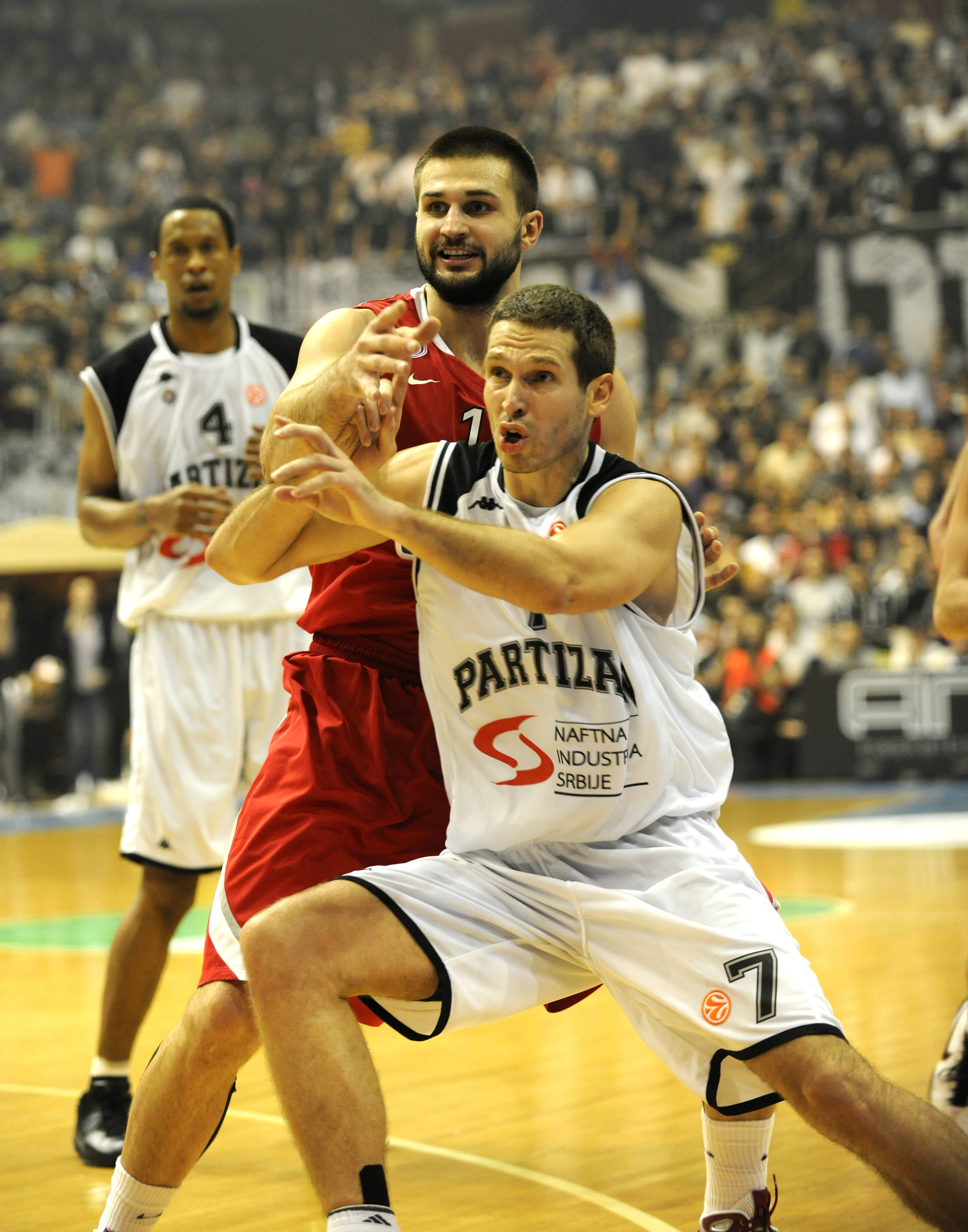 _DSC7061